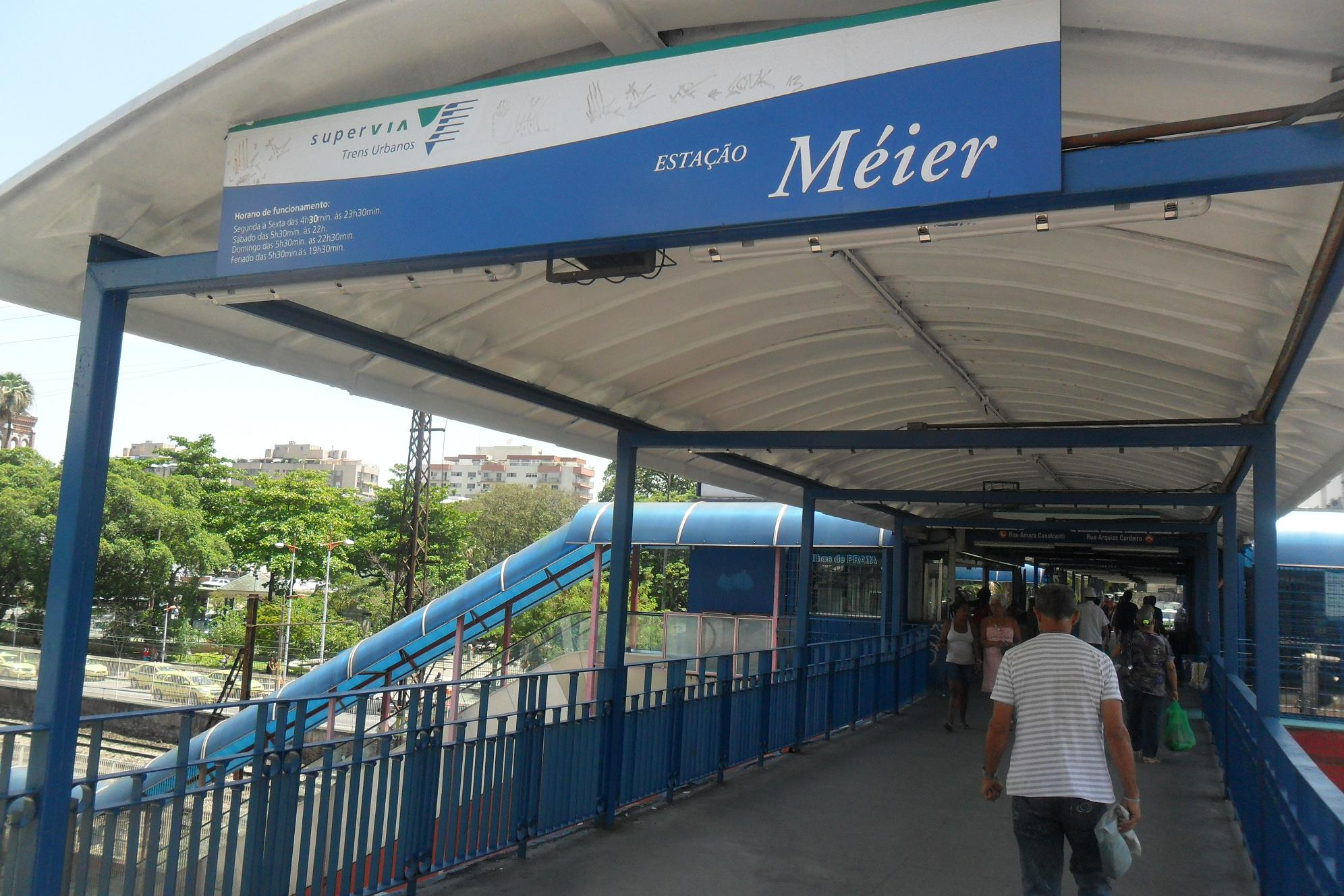 Estação Meier